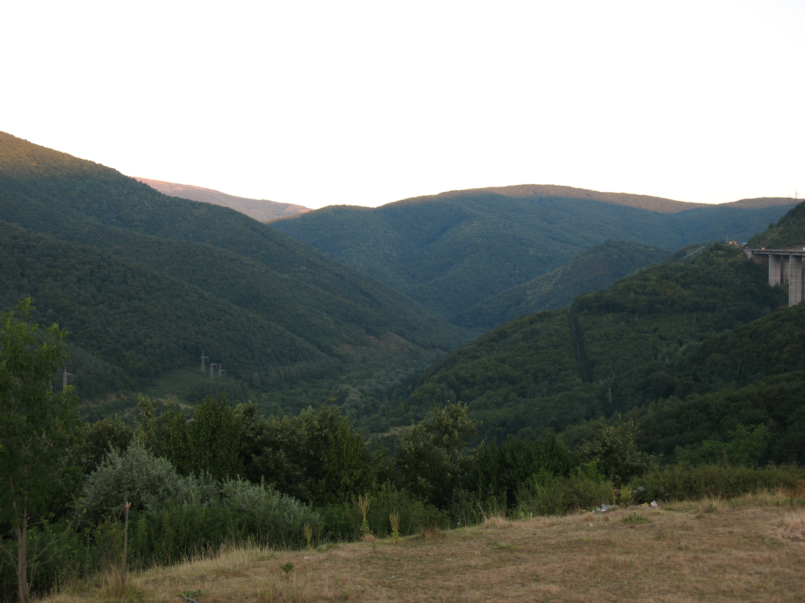 Устието на прохода Арабаконак